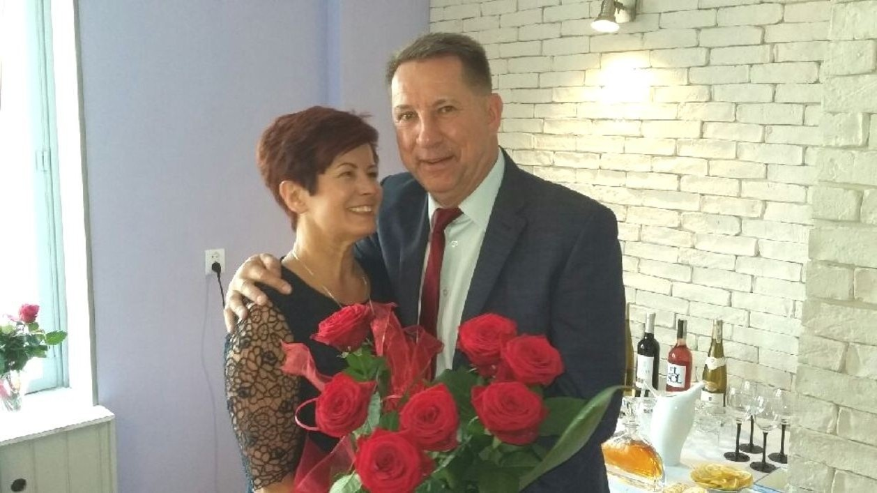 Jolanta, Krzysztof Koziorowicz